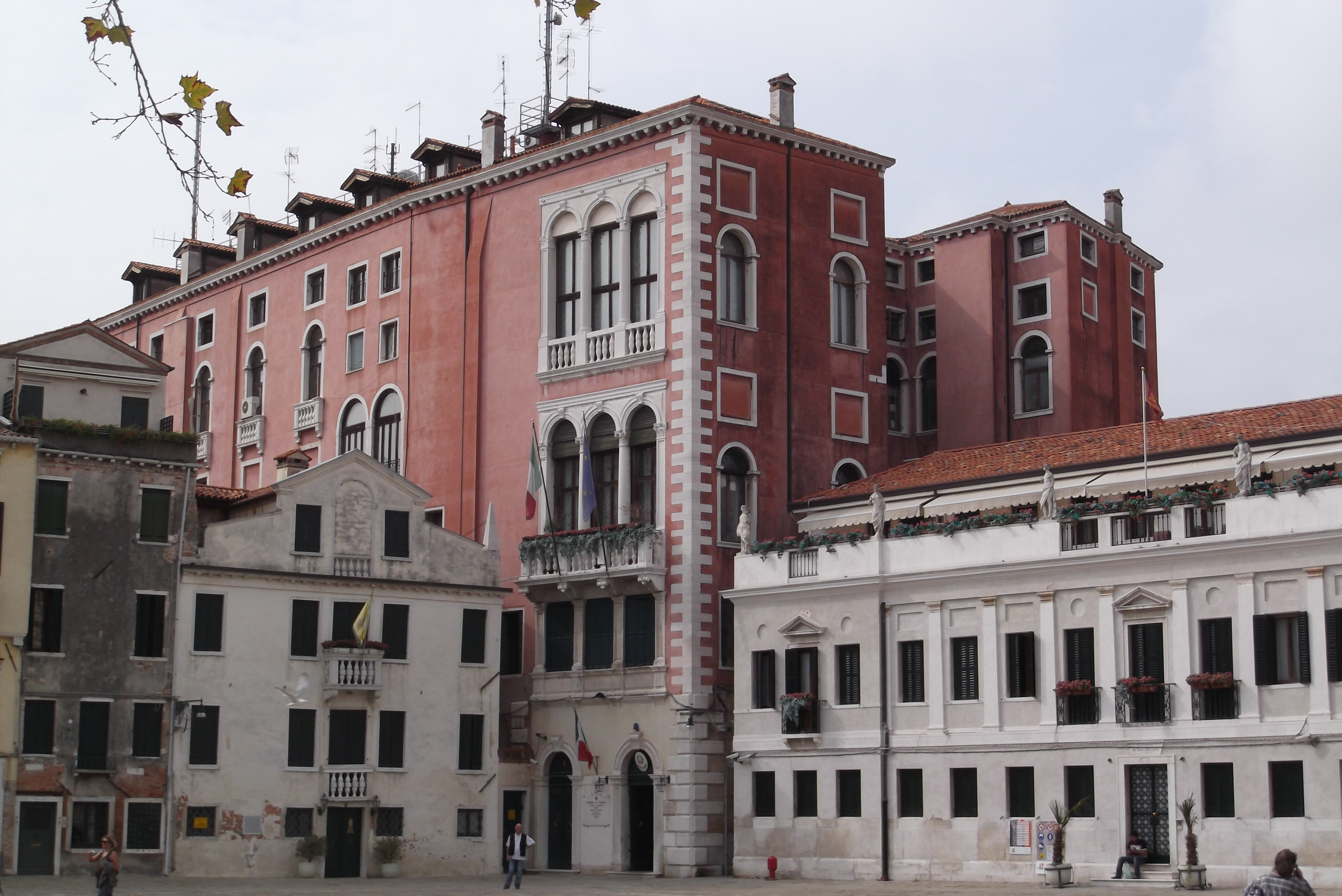 San Polo, 30100 Venice, Italy